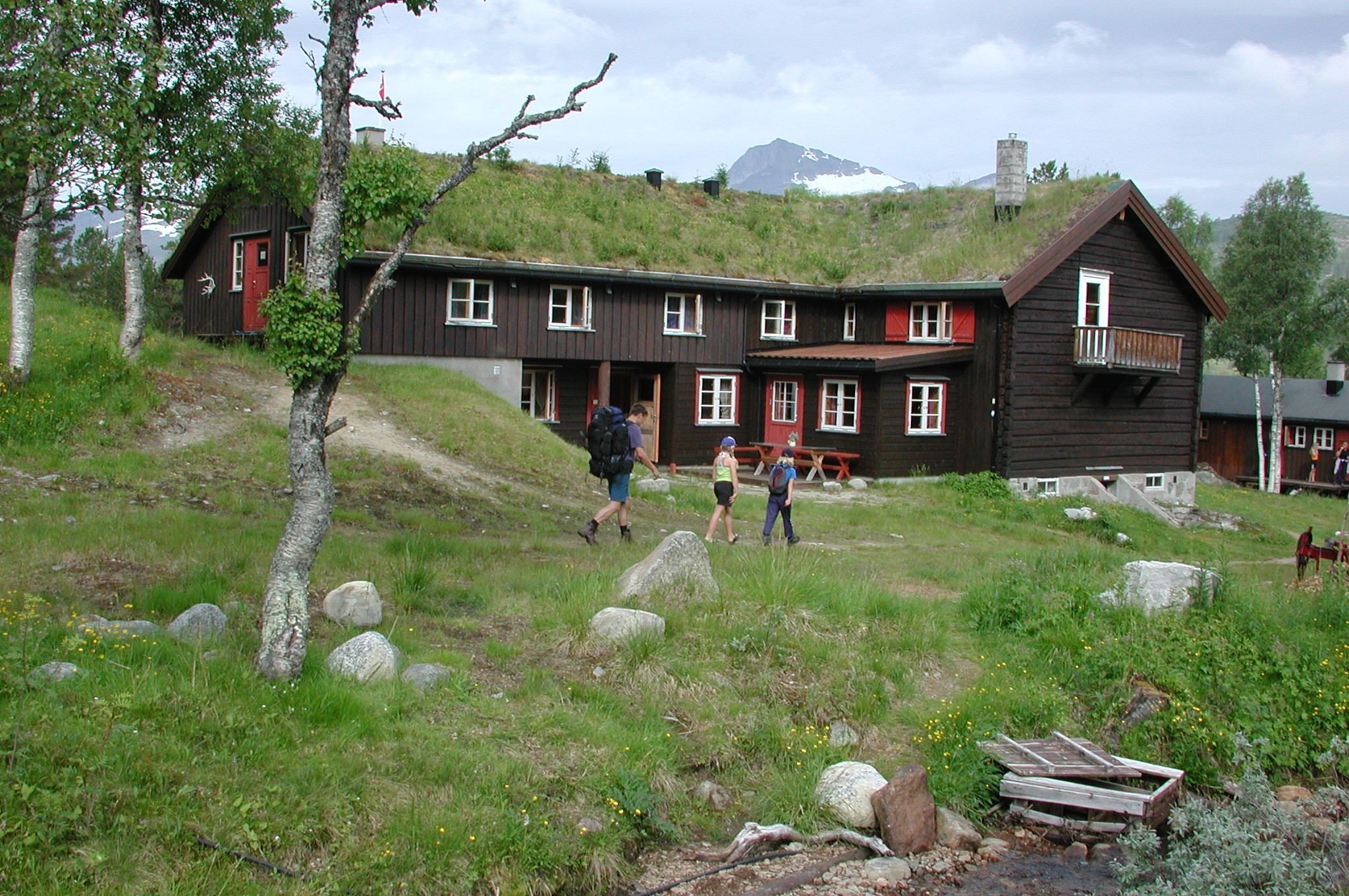 Trollheimshytta i Trollheimen i Møre og Romsdal.